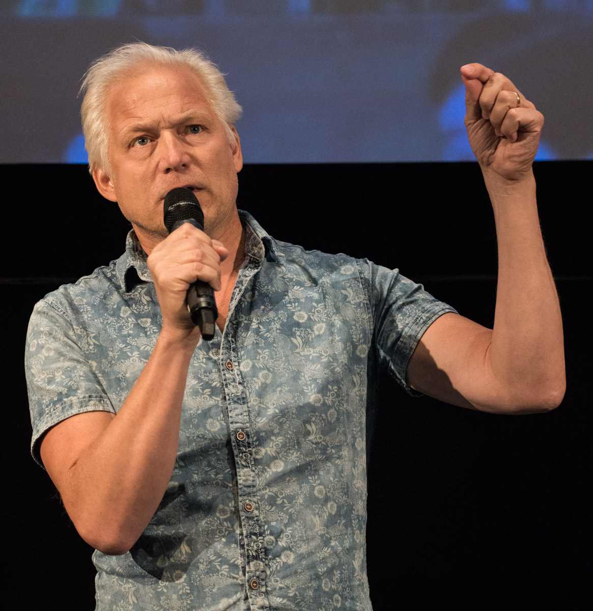 Hannes Holm under presentationen av den Svenska filmhösten i Filmhuset i Stockholm den 17 augusti 2015.